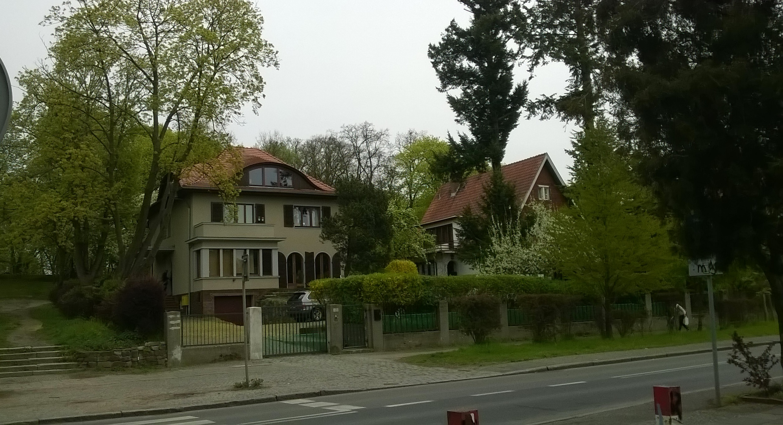 Ul. Stanisława Wyspiańskiego w Szczecinie, wylot ul. Heleny Kurcyuszowej - uliczki biegnącej stromo od al. Wojska Polskiego (w pobliżu placu Gałczyńskiego z rzeźbą "Zaczarowana Dorożka") wprost do willi Heleny Kurcyusz (ul.Wyspiańskiego 7). Schody i alejka obok willi prowadzą bezpośrednio do Parku Kasprowicza.